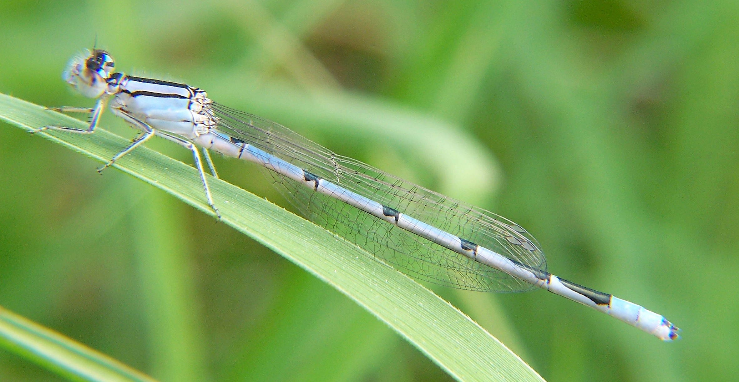 Adult familiar bluet damselfly, Enallagma civile